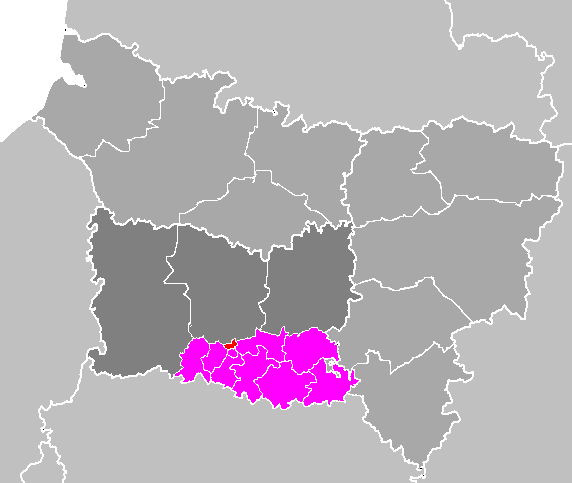 Maps of arrondissements and cantons of France: Département de l'Oise